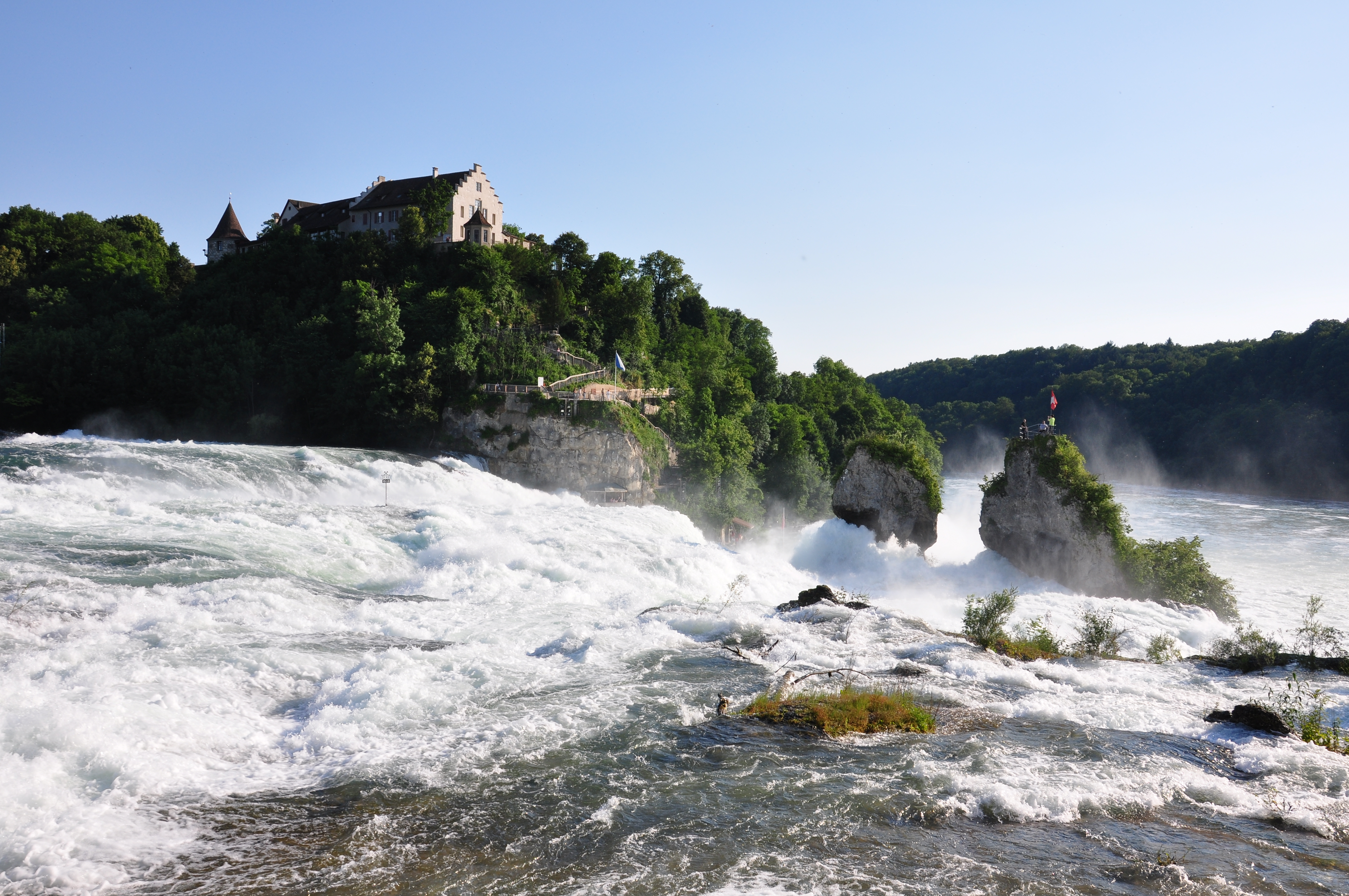 Rheinfall and Schloss Laufen in Laufen-Uhwiesen as seen from Neuhausen am Rheinfall (Switzerland)